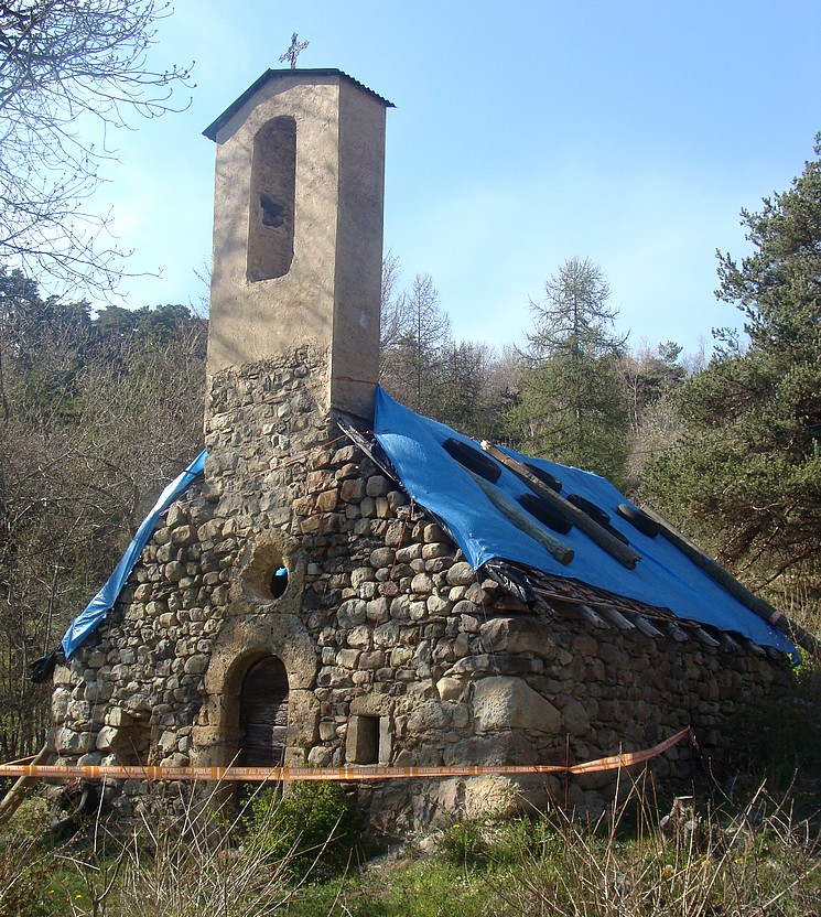 Vue d'ensemble de la chapelle des Michauds en instance de restauration (printemps 2014).